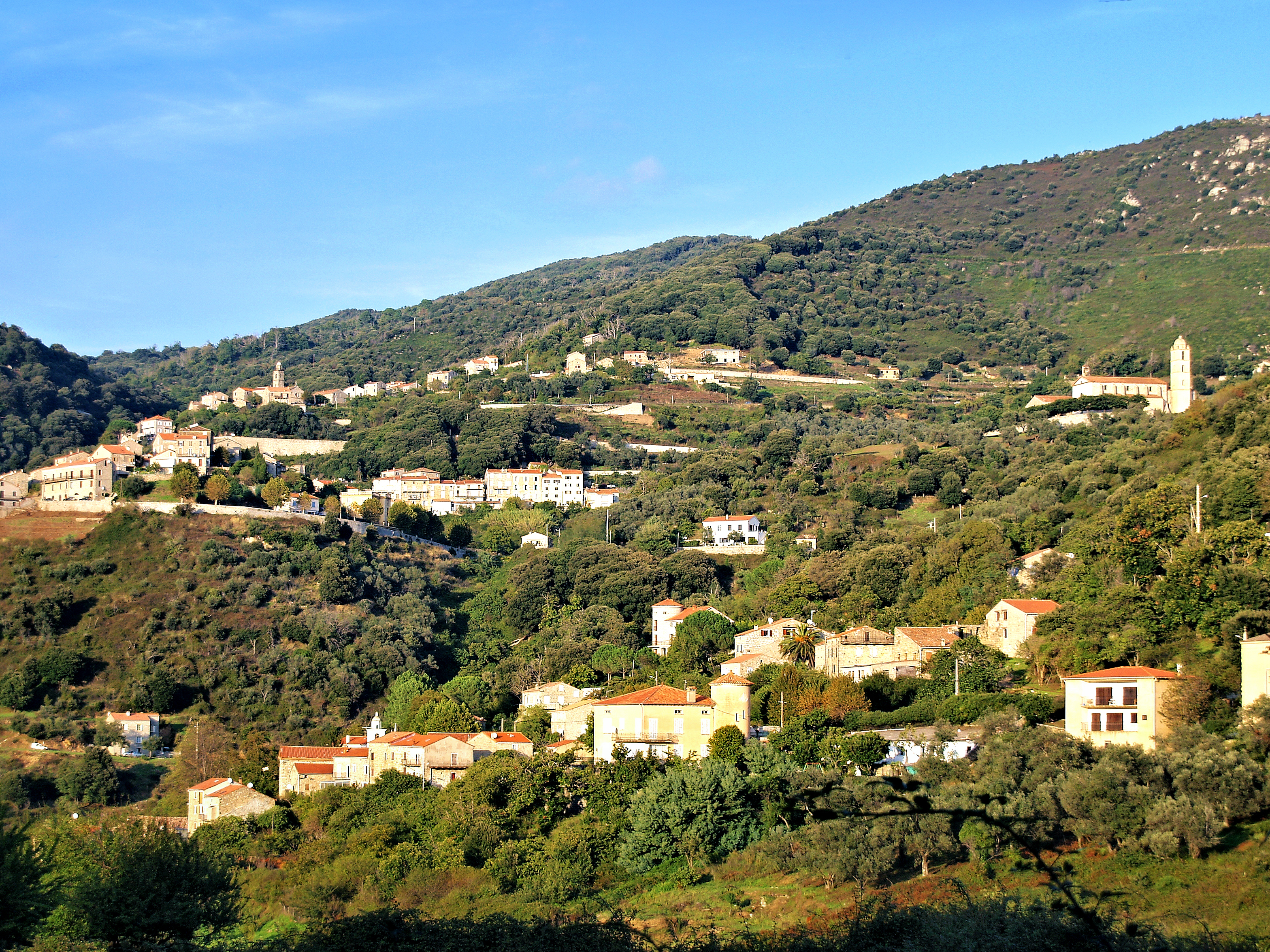 Olmiccia, Sud-ouest Corse (Corse) - Vue du village, dominé par celui de Sainte-Lucie-de-Tallano